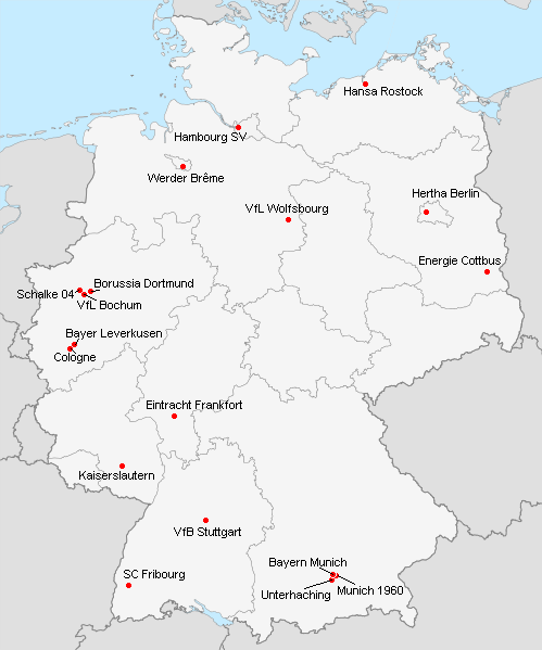 Répartition des clubs en 1.Bundesliga 2000-2001.